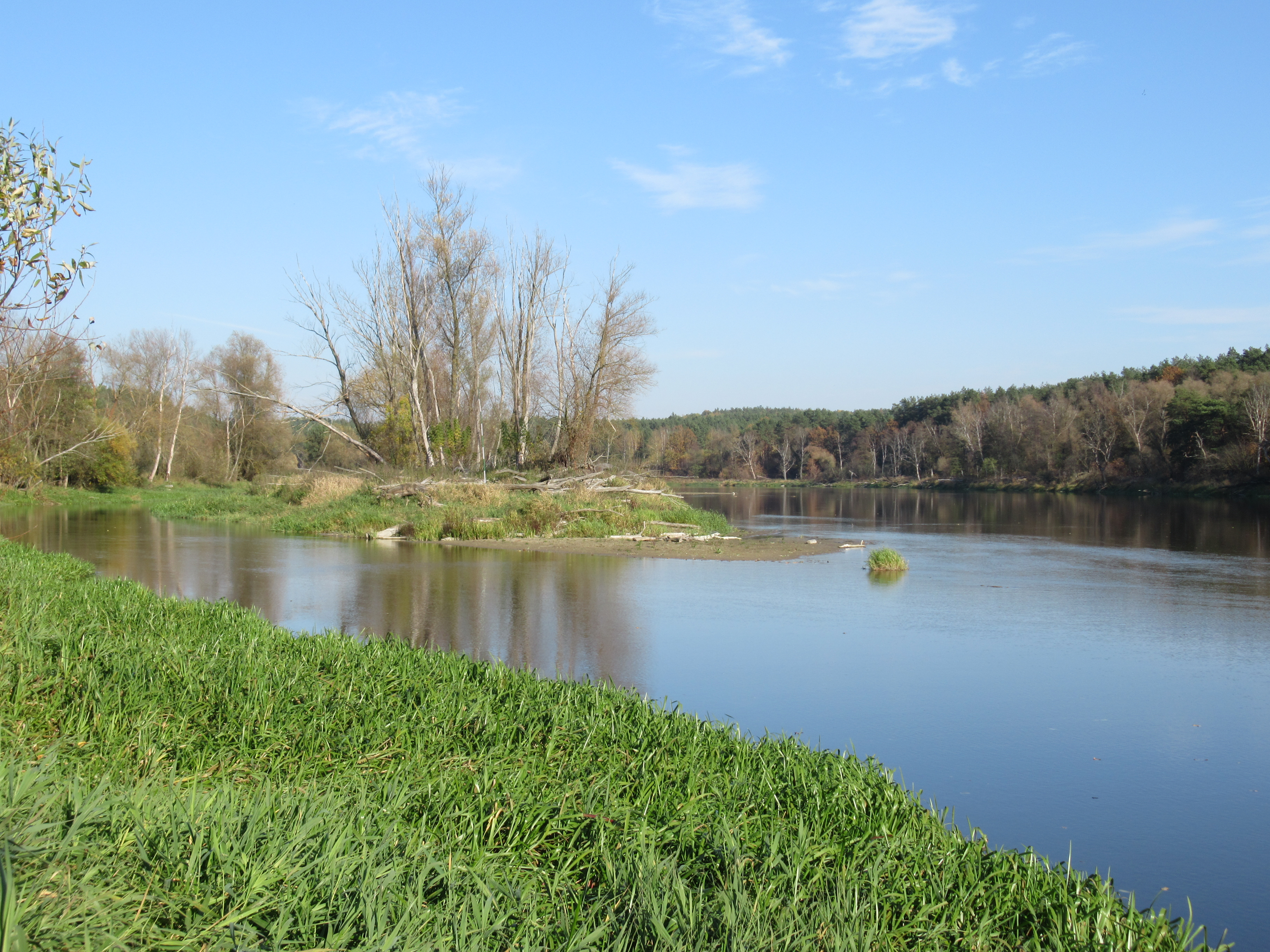 Klepaczew (gm. Sarnaki, pow. łosicki, woj. mazowieckie, Polska). Bug w okolicach wsi.